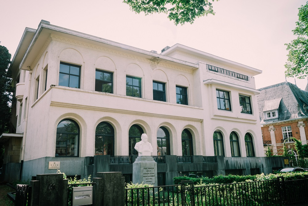 Bâtiment IEE 39-41